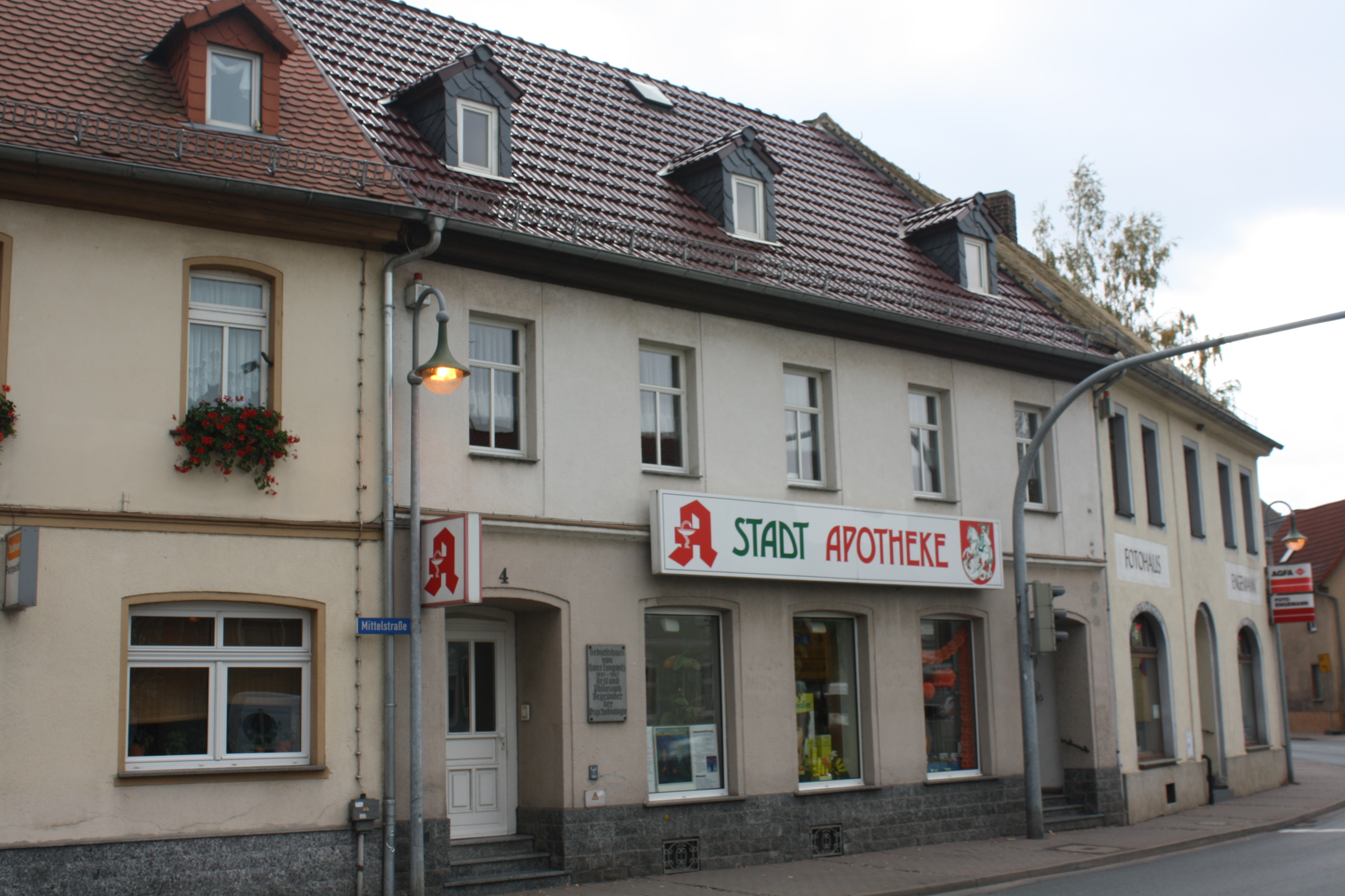 Stadtapotheke und Geburtshaus des Begründers der Psychologie Hans Lungwitz (1881-1967) in Gößnitz/Thüringen